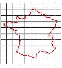 france